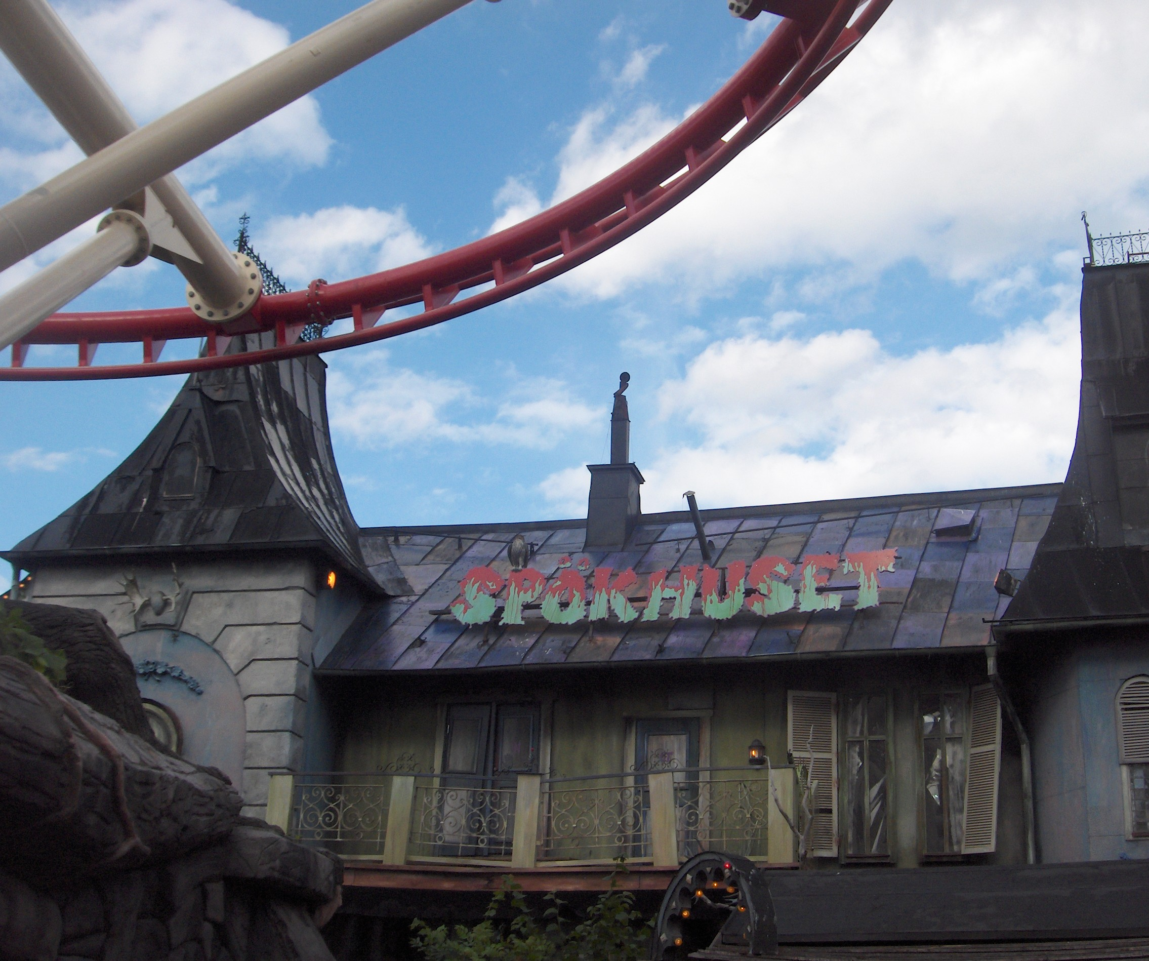 "Spökhuset", the Ghoust house, at Gröna Lund in Stockholm, Sweden.